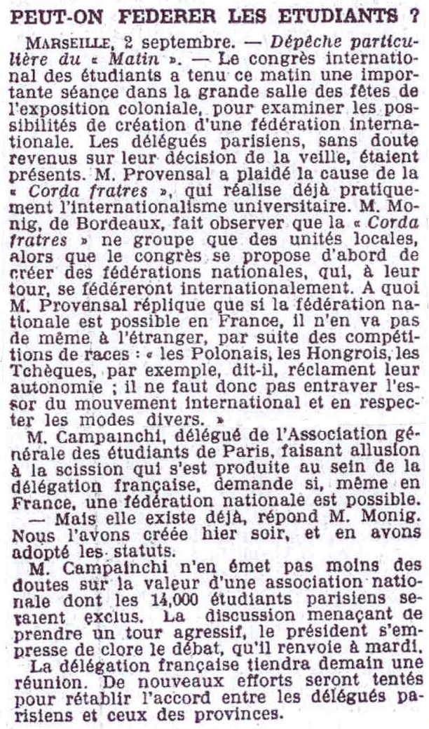 Article du journal parisien "Le Matin" sur le Congrès international des étudiants tenu à Marseille du 31 août au 7 septembre 1906.